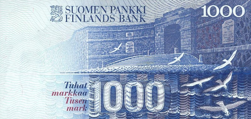 1.000 markkaa